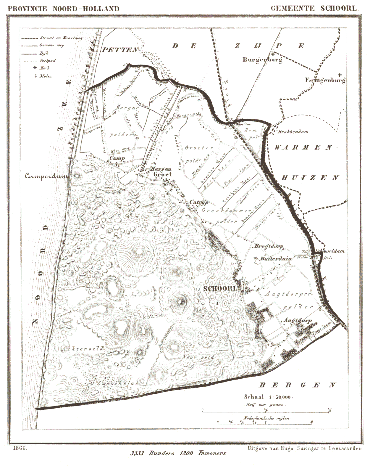 Kaart van Schoorl uit Gemeente Atlas van Nederland, J. Kuyper 1865-1870, Uitgave Hugo Suringar Leeuwarden.